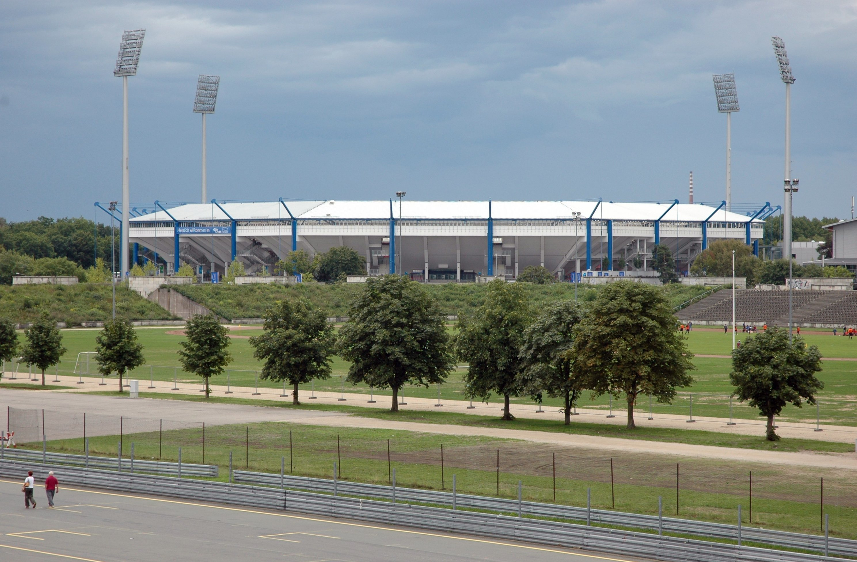 Das Frankenstadion in Nürnberg, fotografiert von der Zepellintribüne